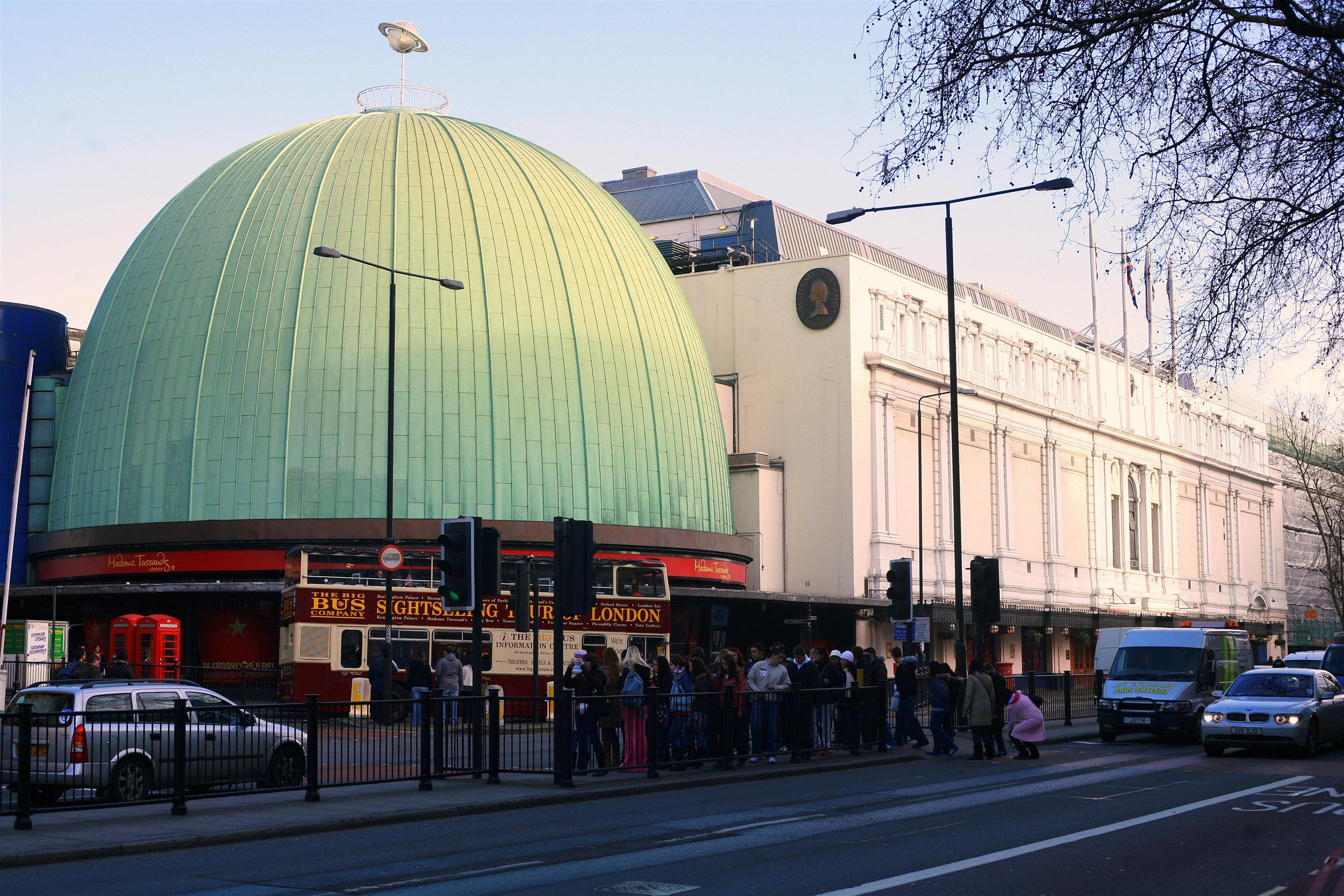 Londyński budynek Muzeum Figur Woskowych Madame Tussaud